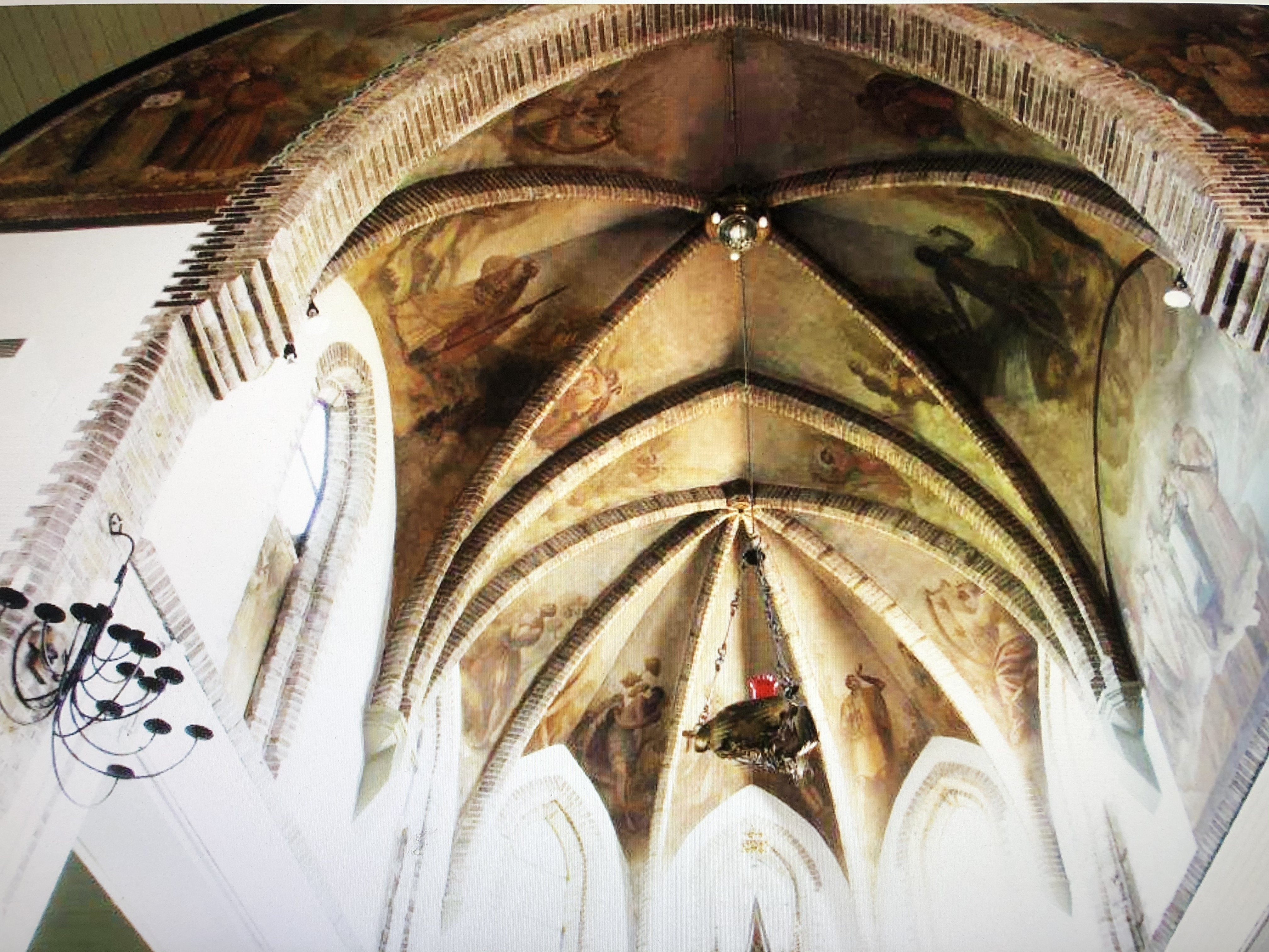 Gewelven van de Sint-Clemenskerk (Nes, Ameland) met schilderingen van Jacob Ydema, voor de brand van 2013.